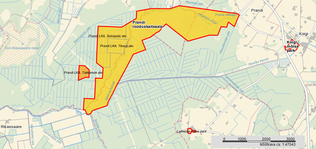 Prandi LKA paiknemine kaardil. Põhineb Maa-ameti kaardil.